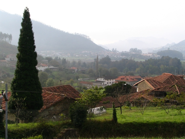 Peñaullán desde la vega en el mes de noviembre 12:00 horas de la mañana